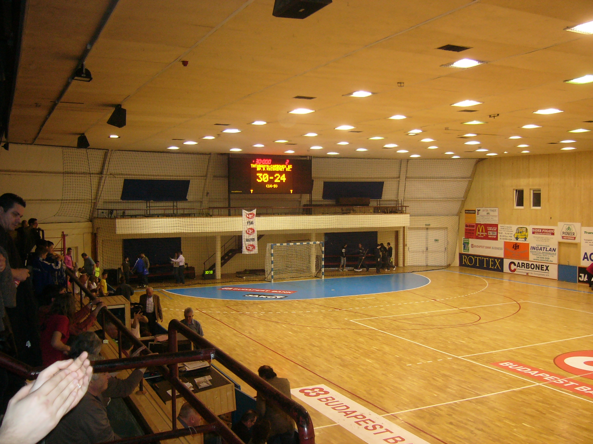 Tatabánya csarnoka belülről